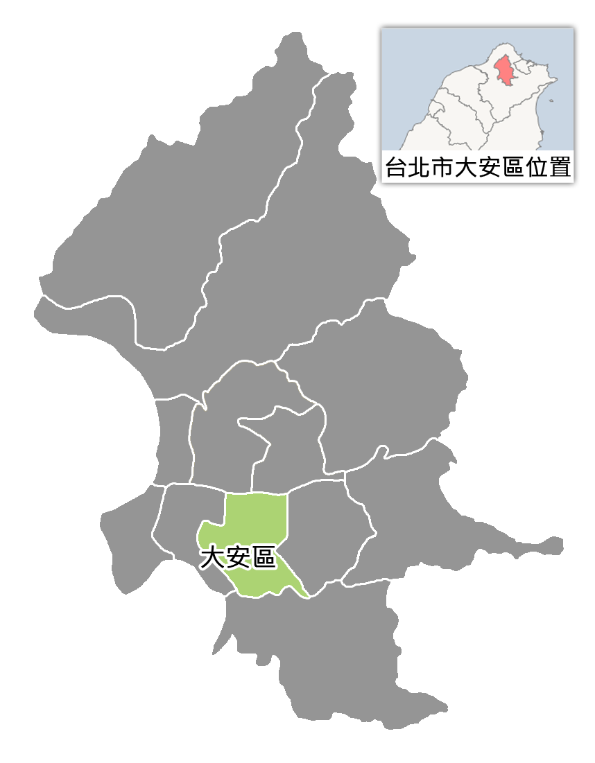 台北市大安區位置